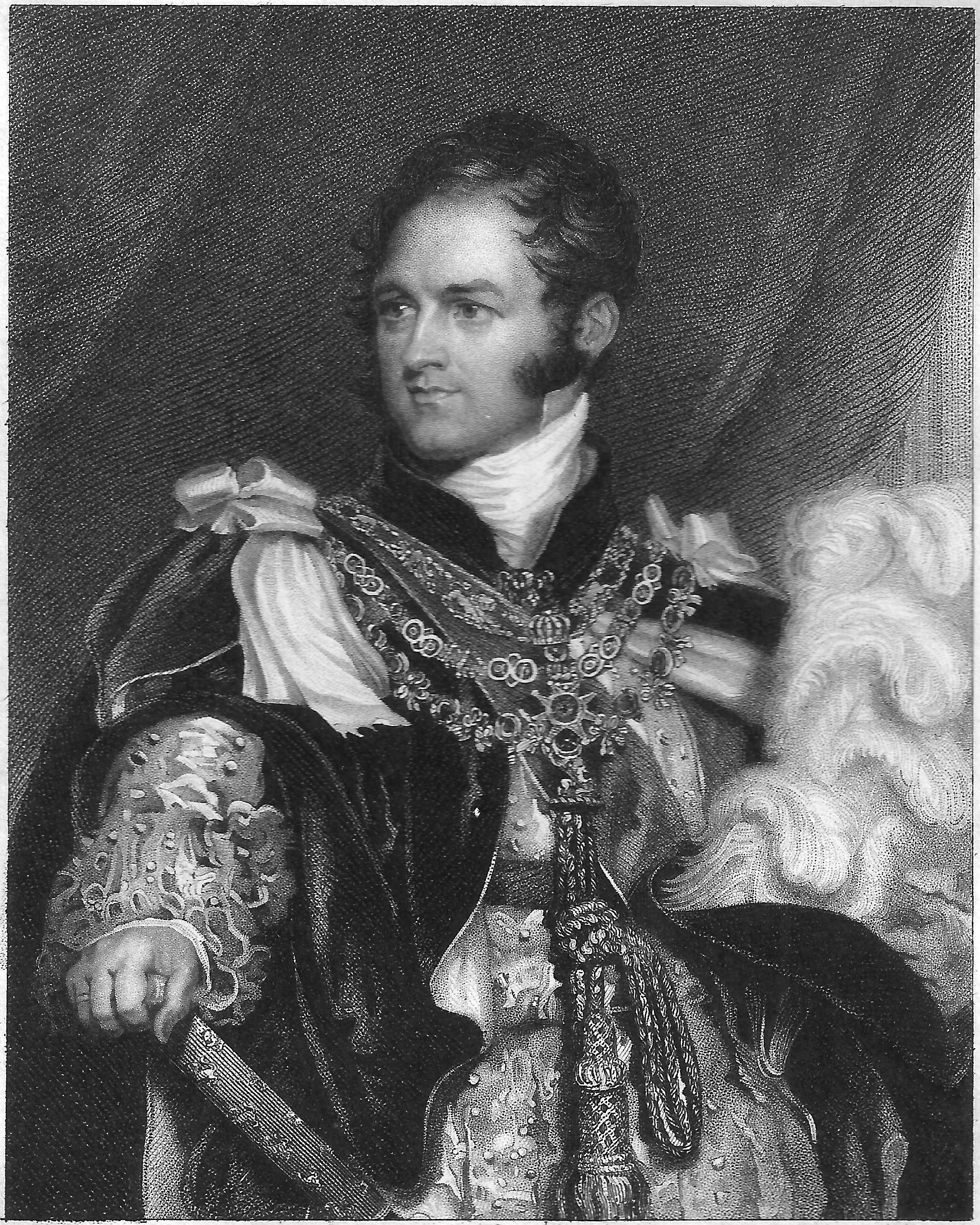 S.A.R. le prince Léopold, prince du Royaume-Uni, prince de Saxe-Cobourg-Saalfeld, duc de Saxe, futur roi Léopold Ier de Belgique. — Gravure hors-texte en taille-douce sur acier (Pointillé / Stipple engraving).